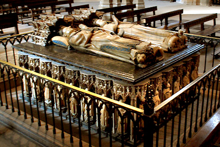 Sepulcro de Carlos III el Noble